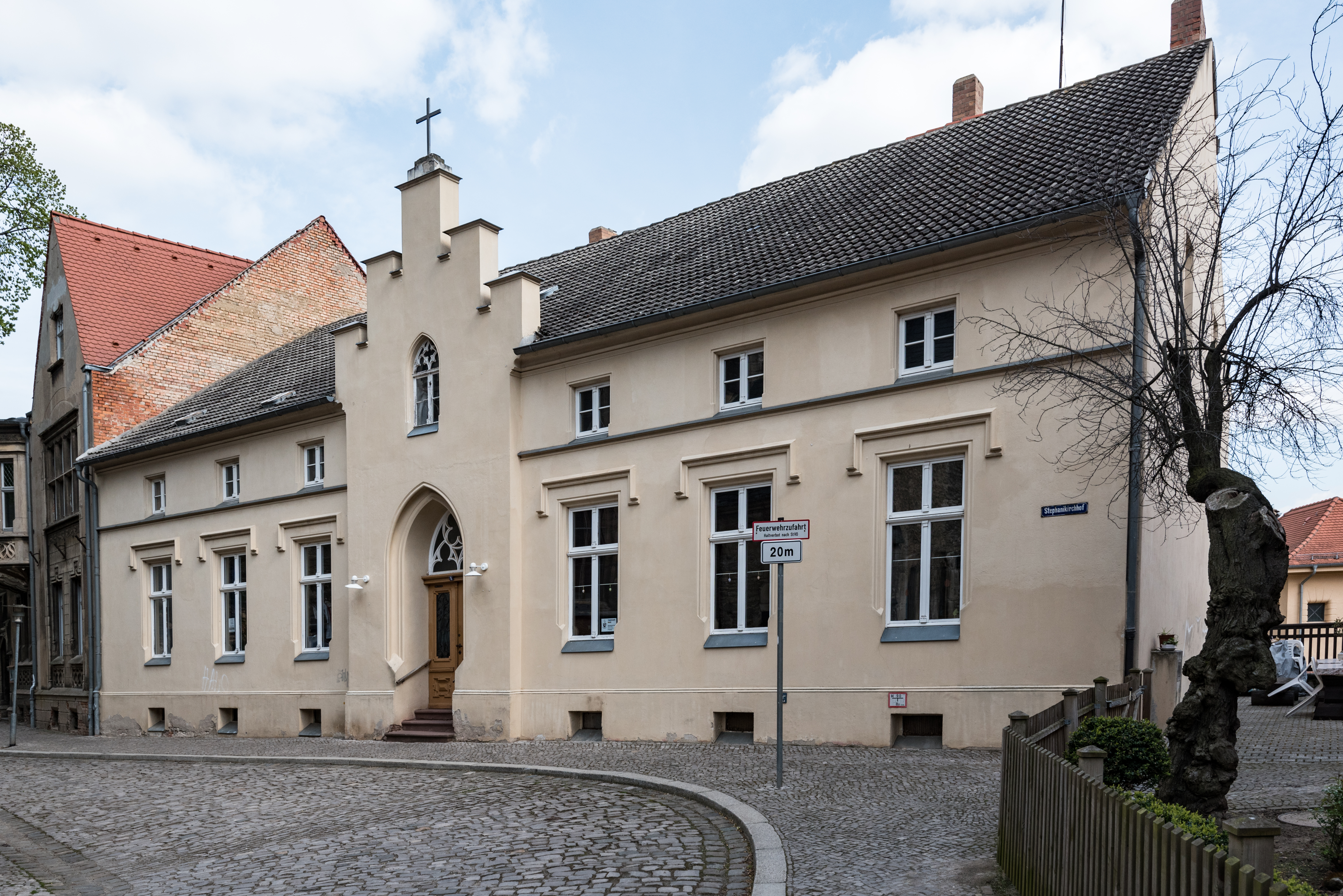 Aschersleben, Stephanikirchhof 8